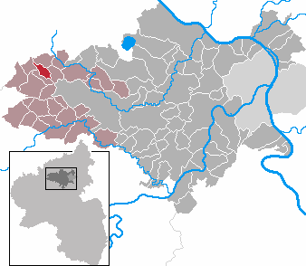 Gemeinde Acht im Landkreis Mayen-Koblenz